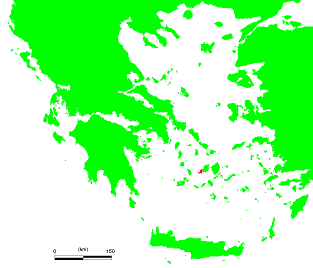 GR Antiparos.PNG (Greek island)